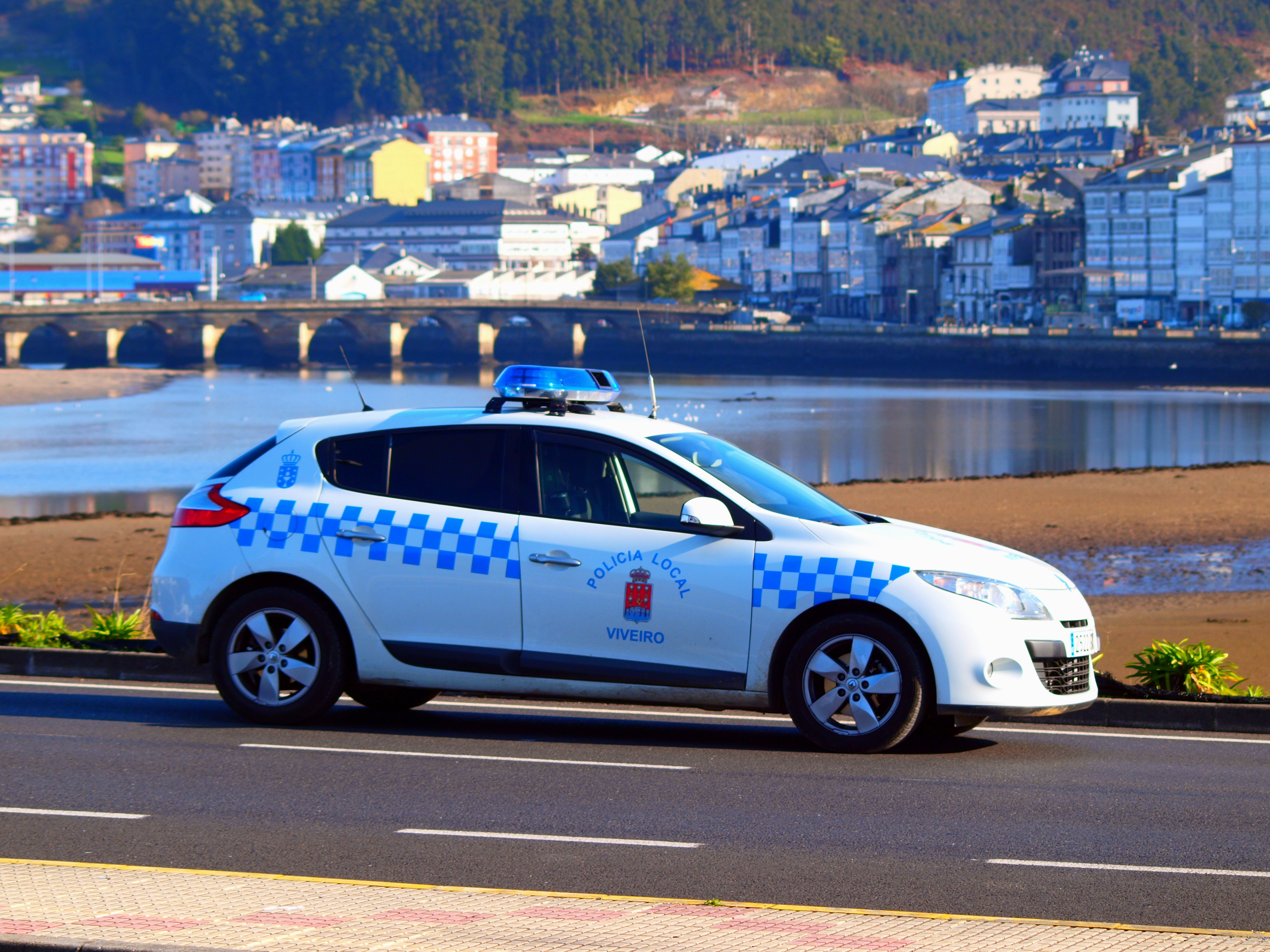 Unidad de la Policía Local de Viveiro (Renault Megane Mk.III)